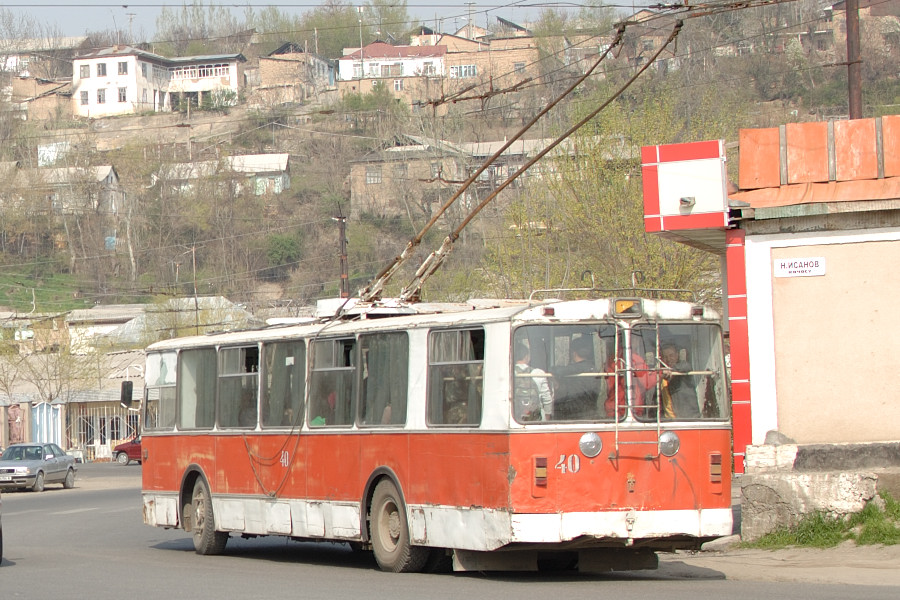 ZiU-9 40 in Osch